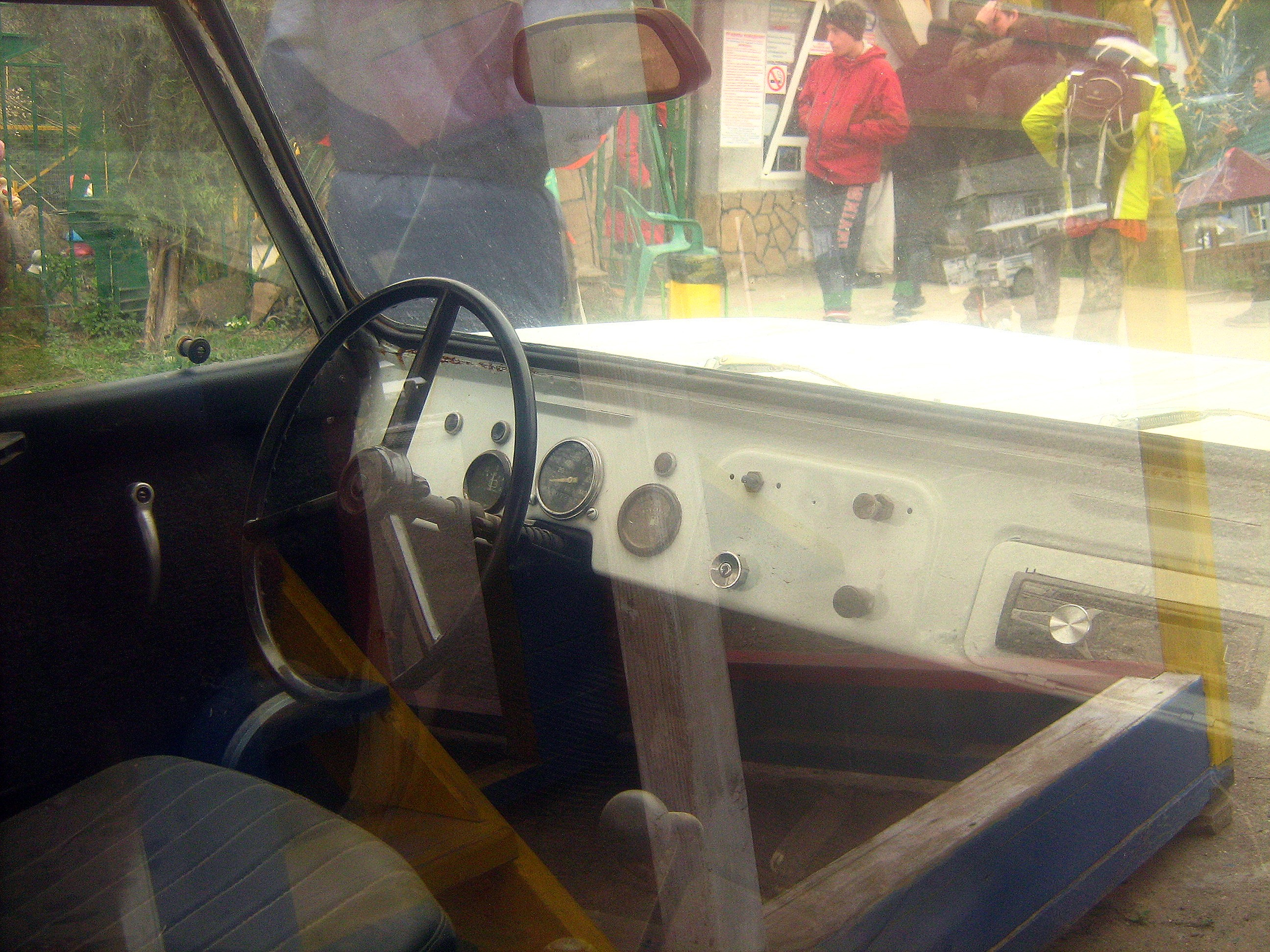 Отреставрированный салон инвалидной мотоколяски СМЗ-С3Д у входа в парк Хаджохская теснина